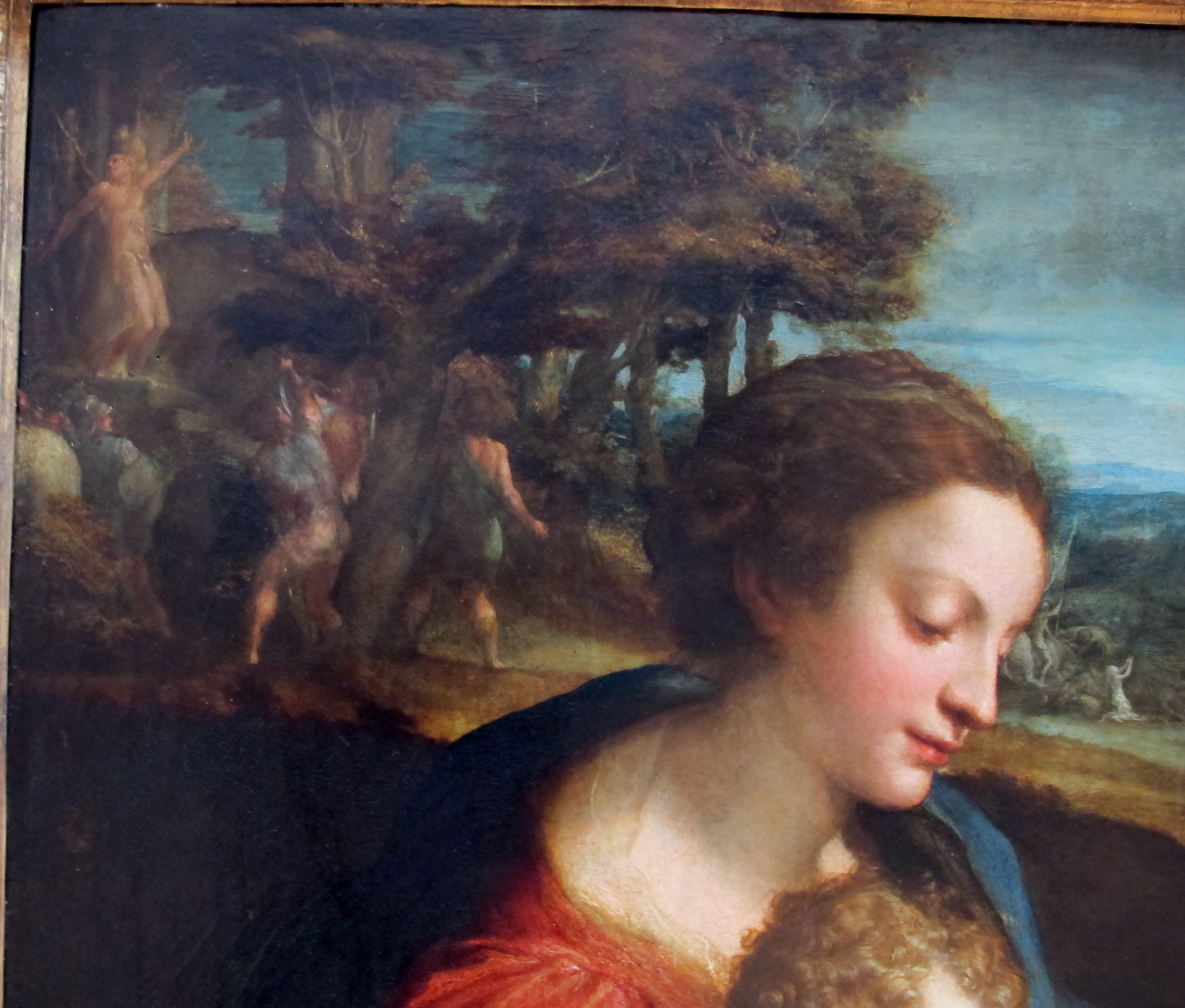 Pittura italiana del Cinquecento, Louvre